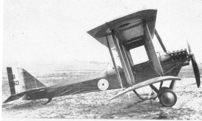 Airco DH.6